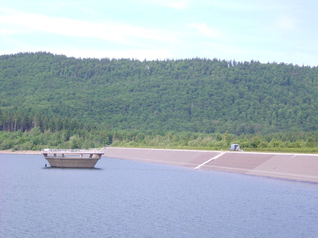 Staumauer der Innerstetalsperre